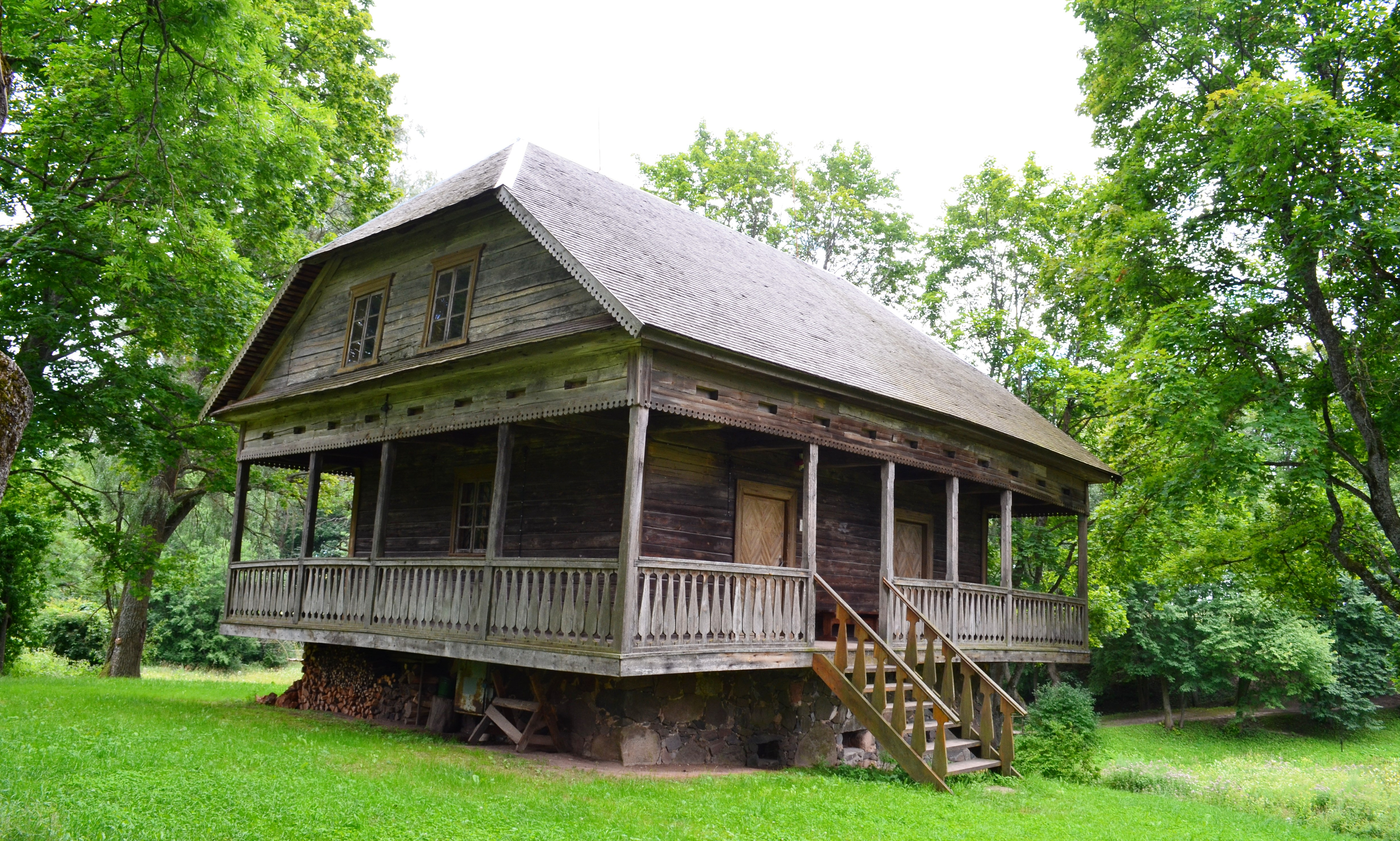 Knygnešių muziejus, Ustronė, Panevėžio raj.